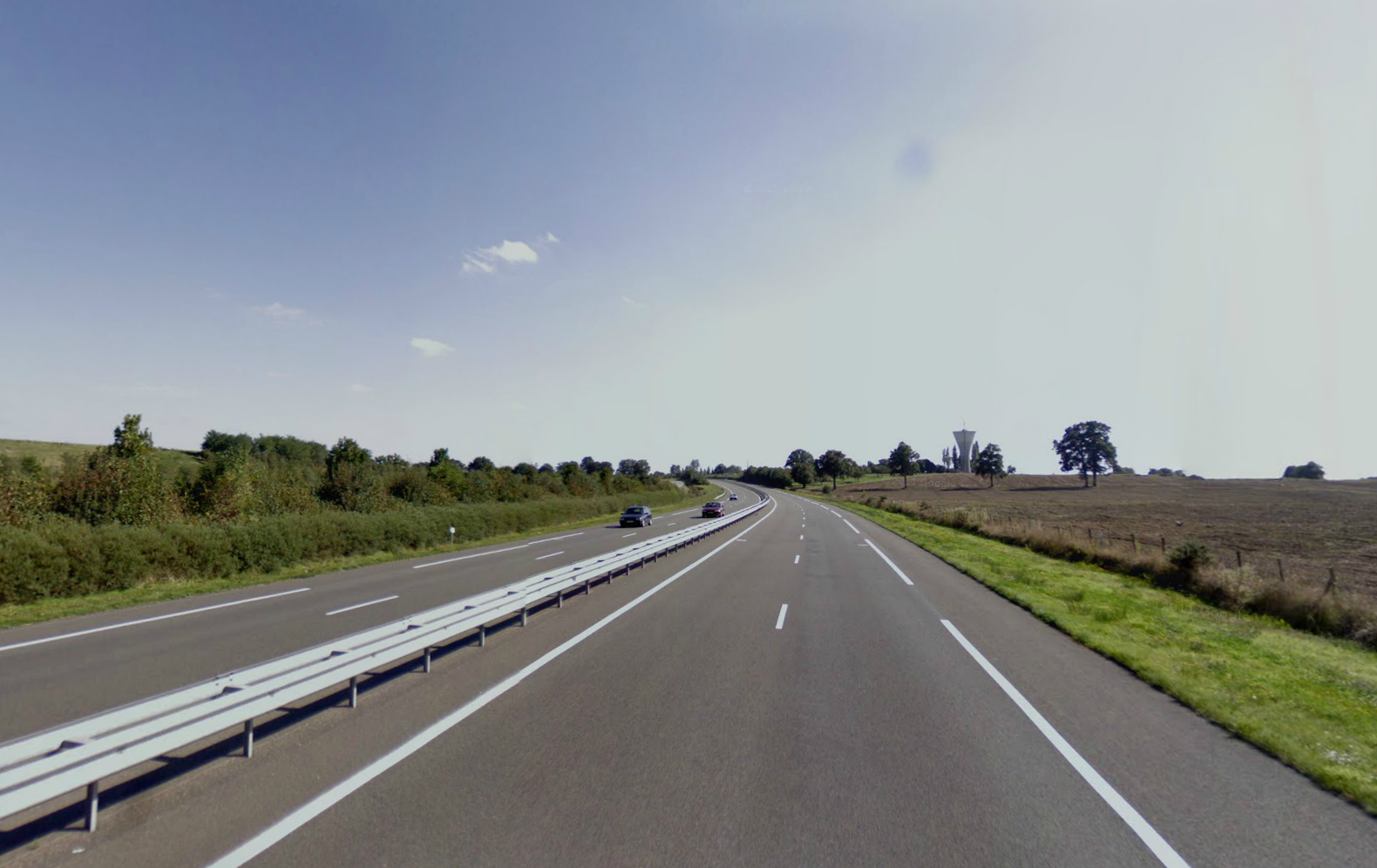 Une portion en 2x2 voies entre les Chênes Secs et la Baconnière.